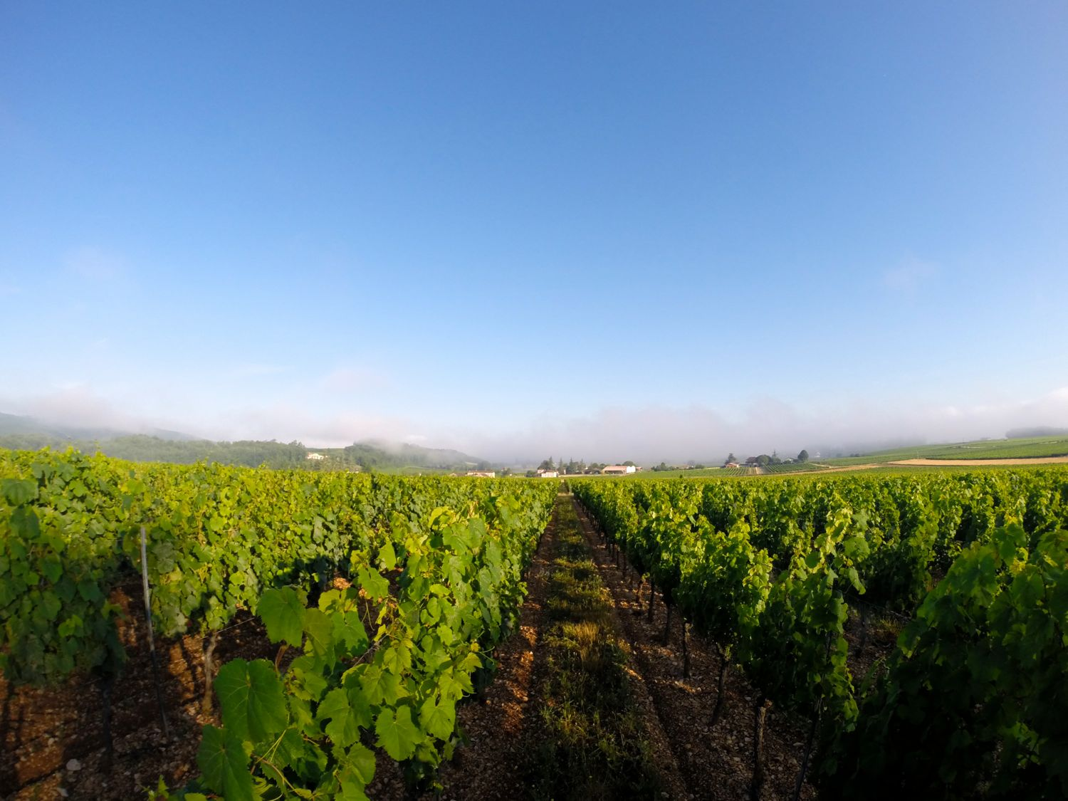 Vineyards of Château du Cèdre in Cahors, Lot, France.